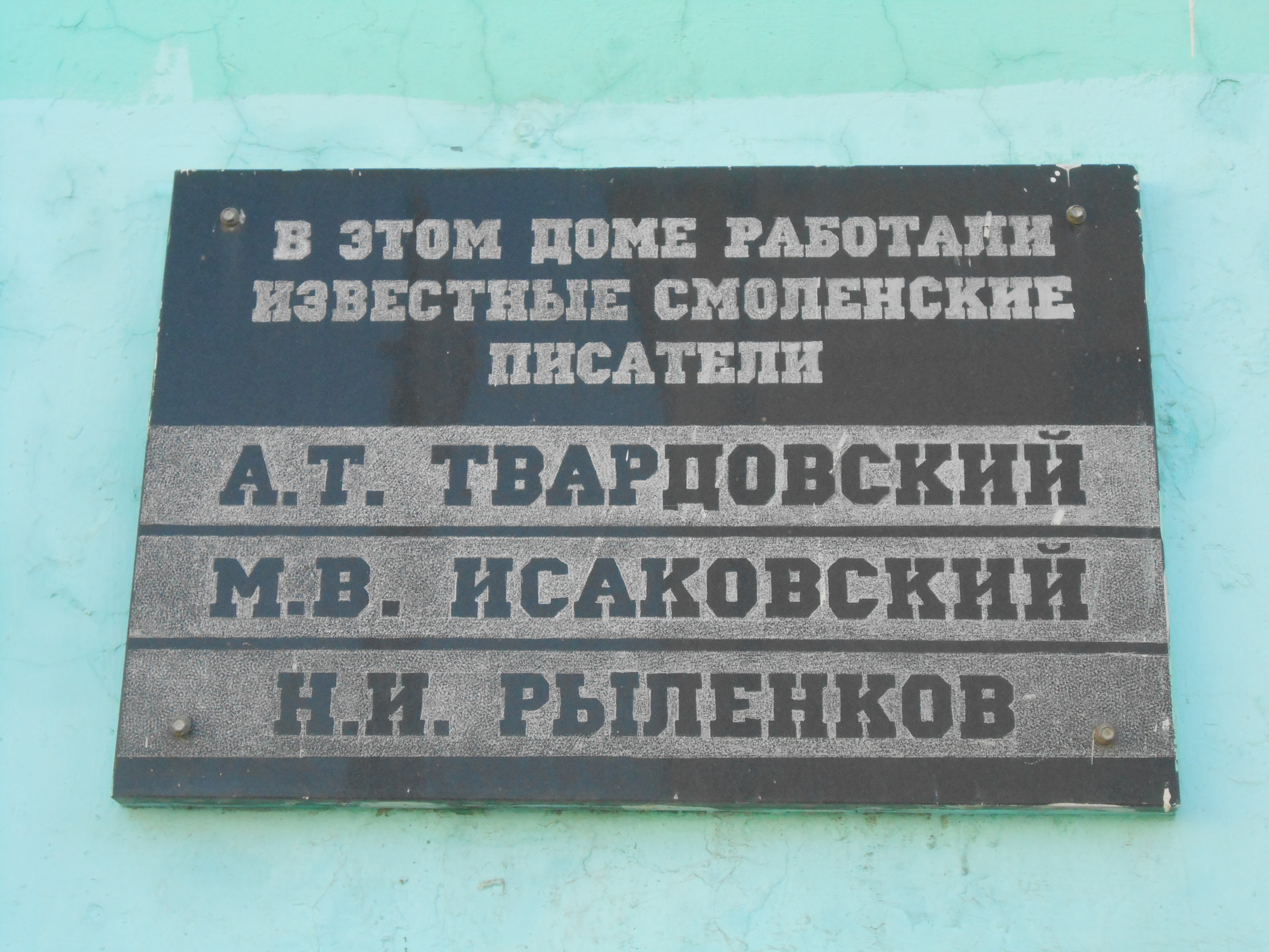 Дом книги: улица Большая Советская, 12/1, Смоленск, Смоленский район, Смоленская область